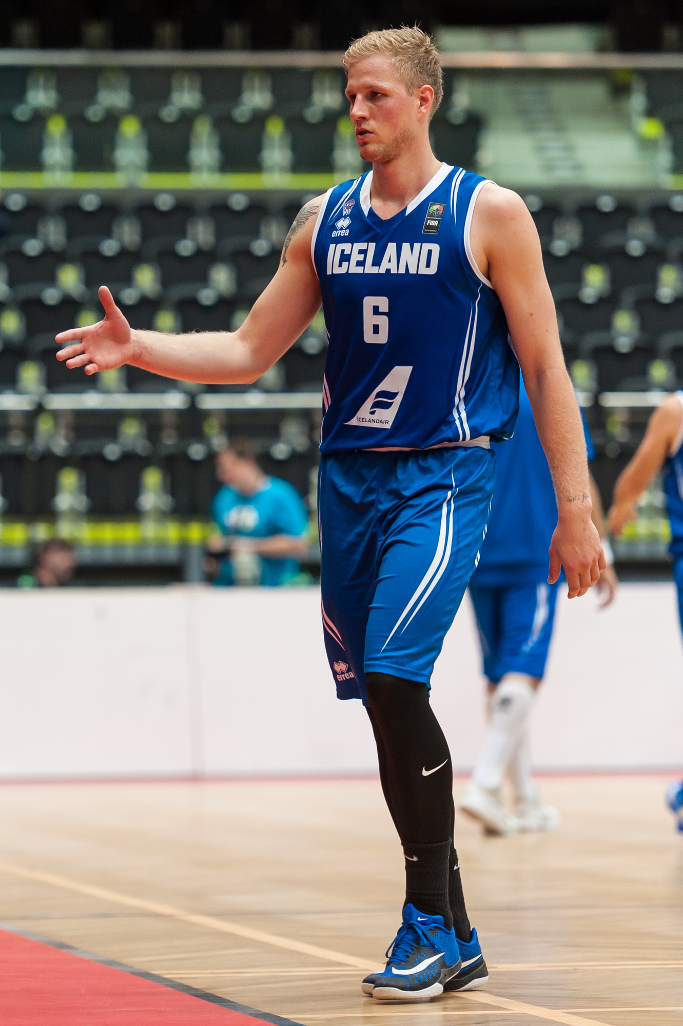 ÖBV Vier-Nationen-Turnier vom 12.-14. August 2016 in Schwechat: Polen vs Island. Bild zeigt Haukur Helgi Palsson (ISL).